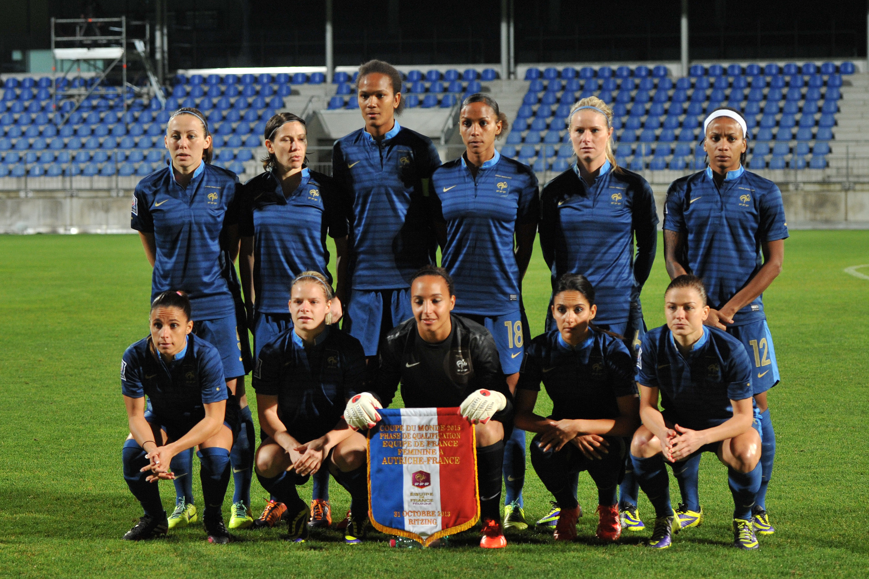 FIFA Women's World Cup 2015 Qualiying Round Österreich - Frankreich am 31. Oktober 2013 in Ritzing: Nationalmannschaft Frankreich stehend v. l.: Delannoy, Bussaglia, Renard, Delie, Henry, Thomis; hockend v. l.: Houara, Le Sommer, Bouhaddi, Nécib, Boulleau